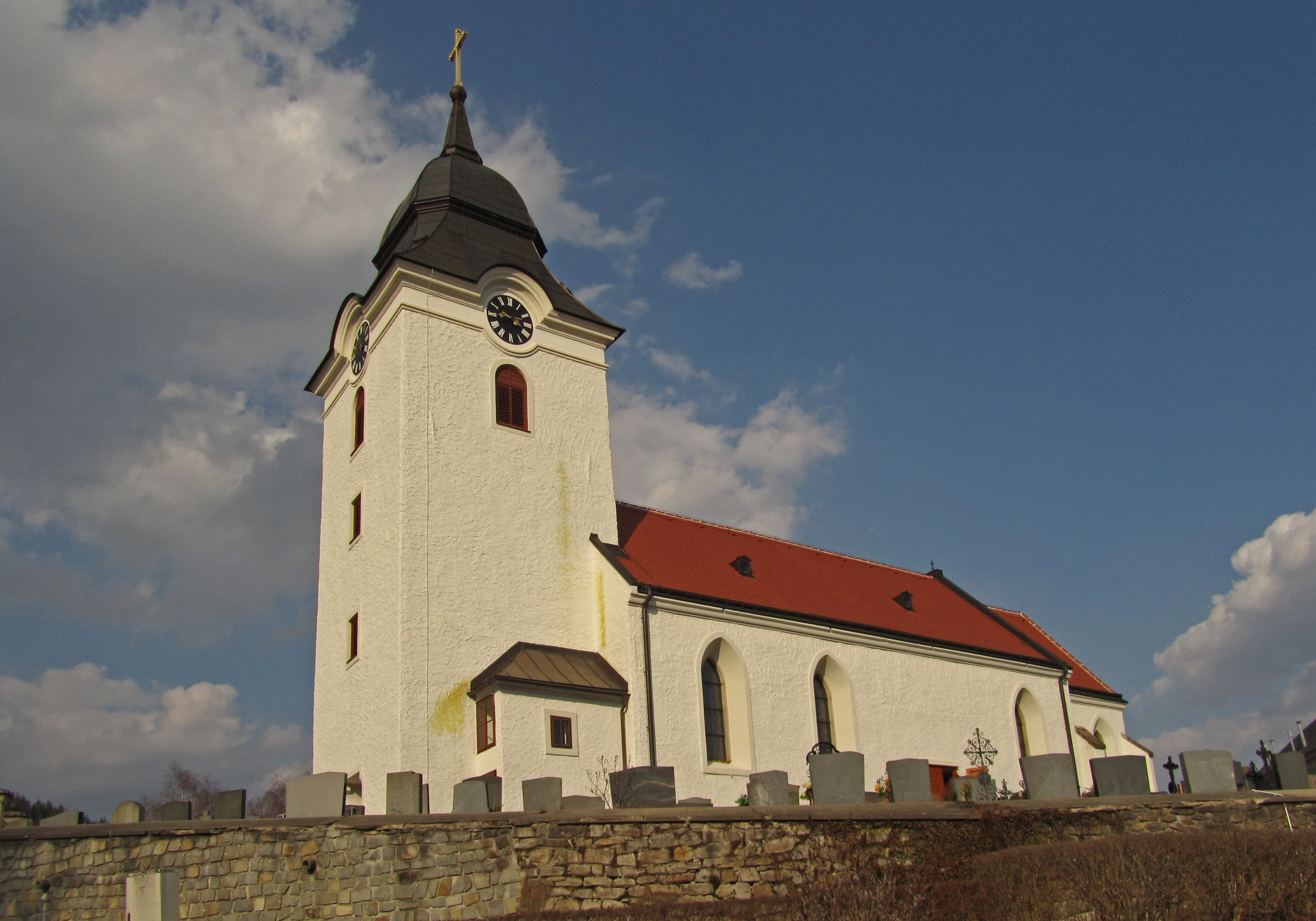 Kath. Pfarrkirche hl. Wenzel und Friedhof